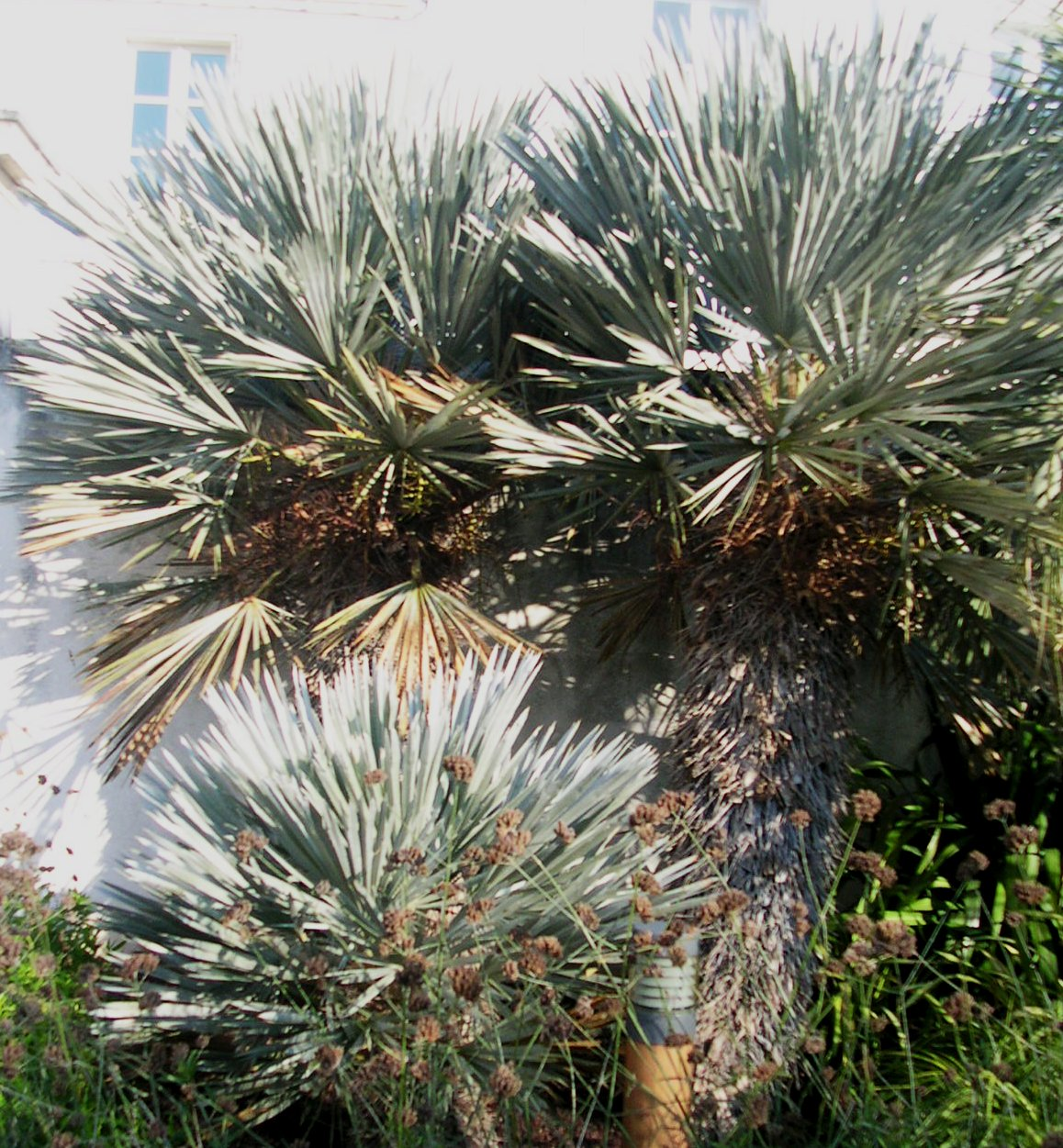 Trithrinax campestris du jardin botanique de La Rochelle (france).